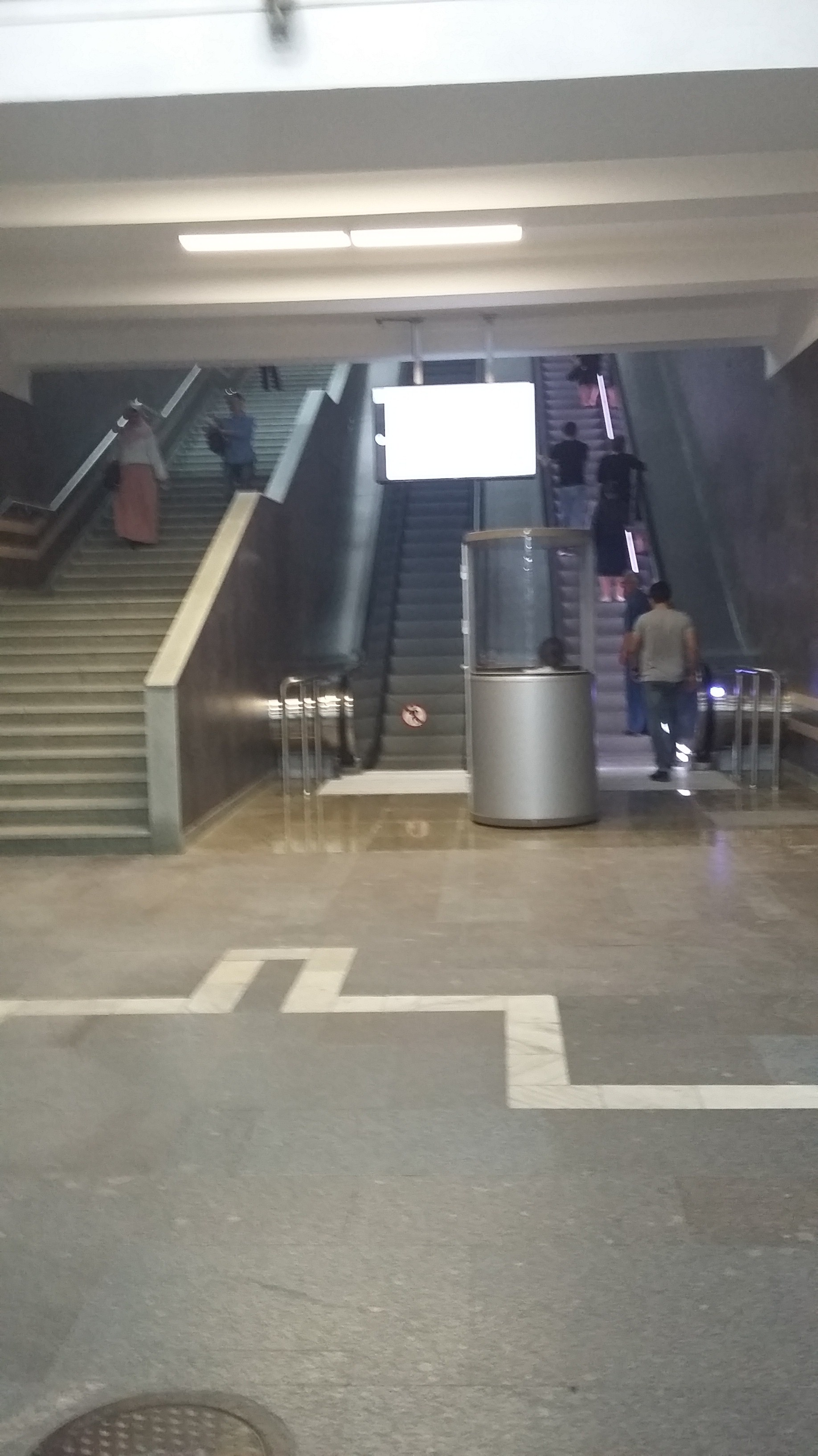 İnşaatçılarda yeni eskalator 2016.06.01